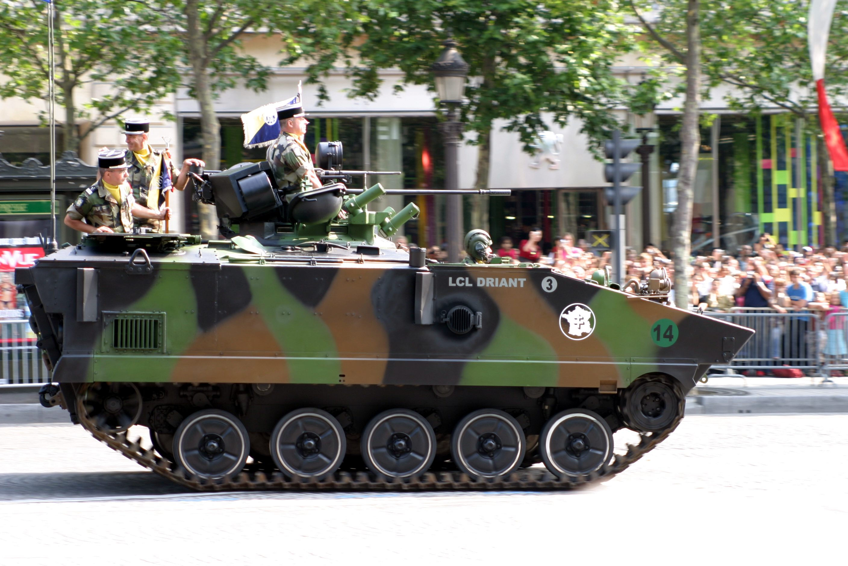 AMX-10P de la Template:2e Brigade Blindée lors du défilé militaire du 14 juillet 200 à Paris.